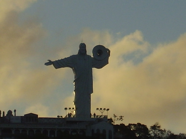 Complejo turístico Cristo Luz ubicado en Balneário Camboriú.